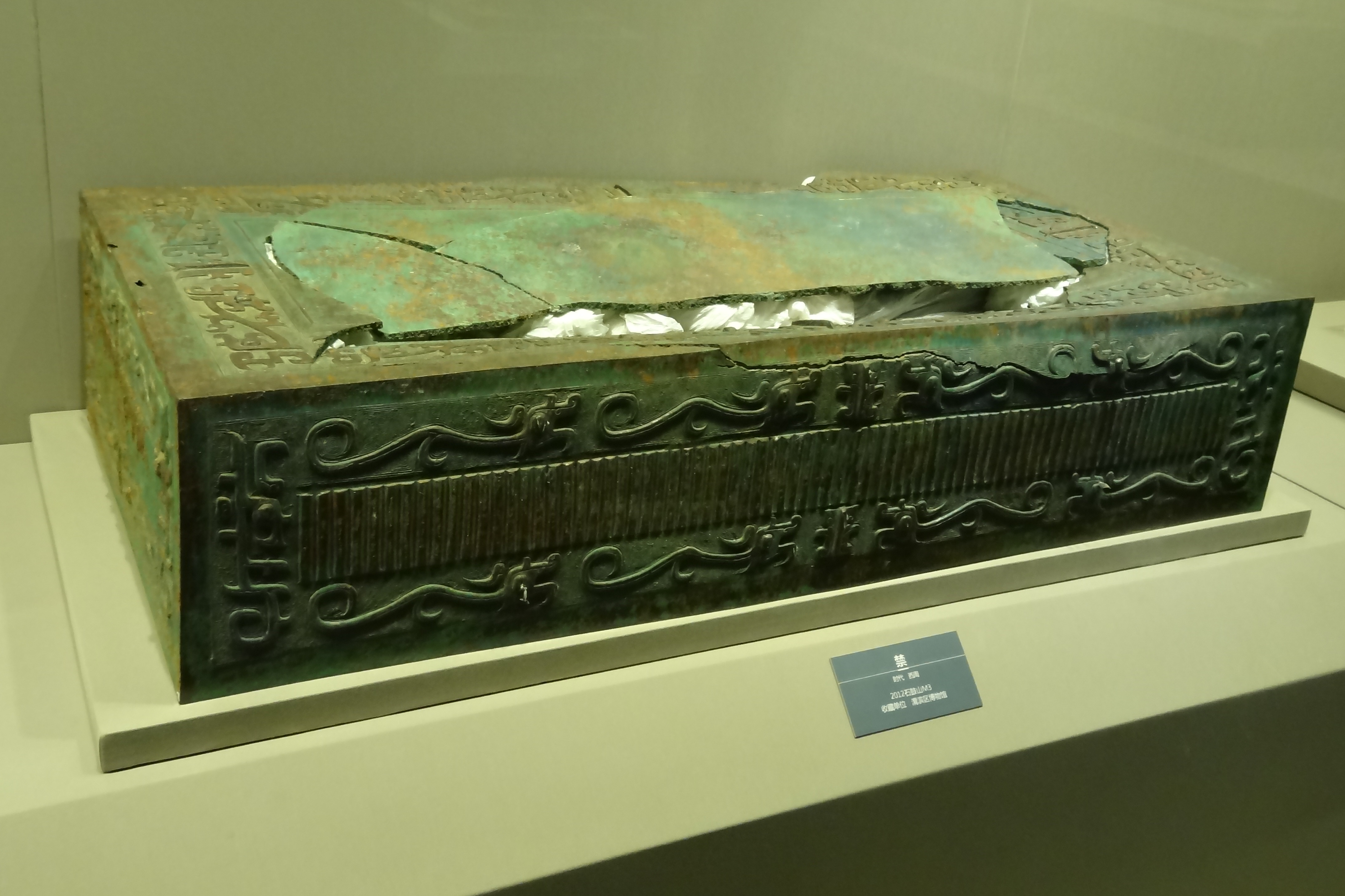 石鼓山1号禁，西周，2012年陕西宝鸡石鼓山西周墓地（M3）出土，现藏于宝鸡青铜器博物院